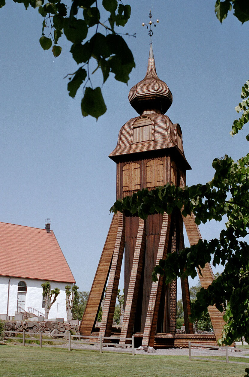 Karlstorp kyrkas klockstapel